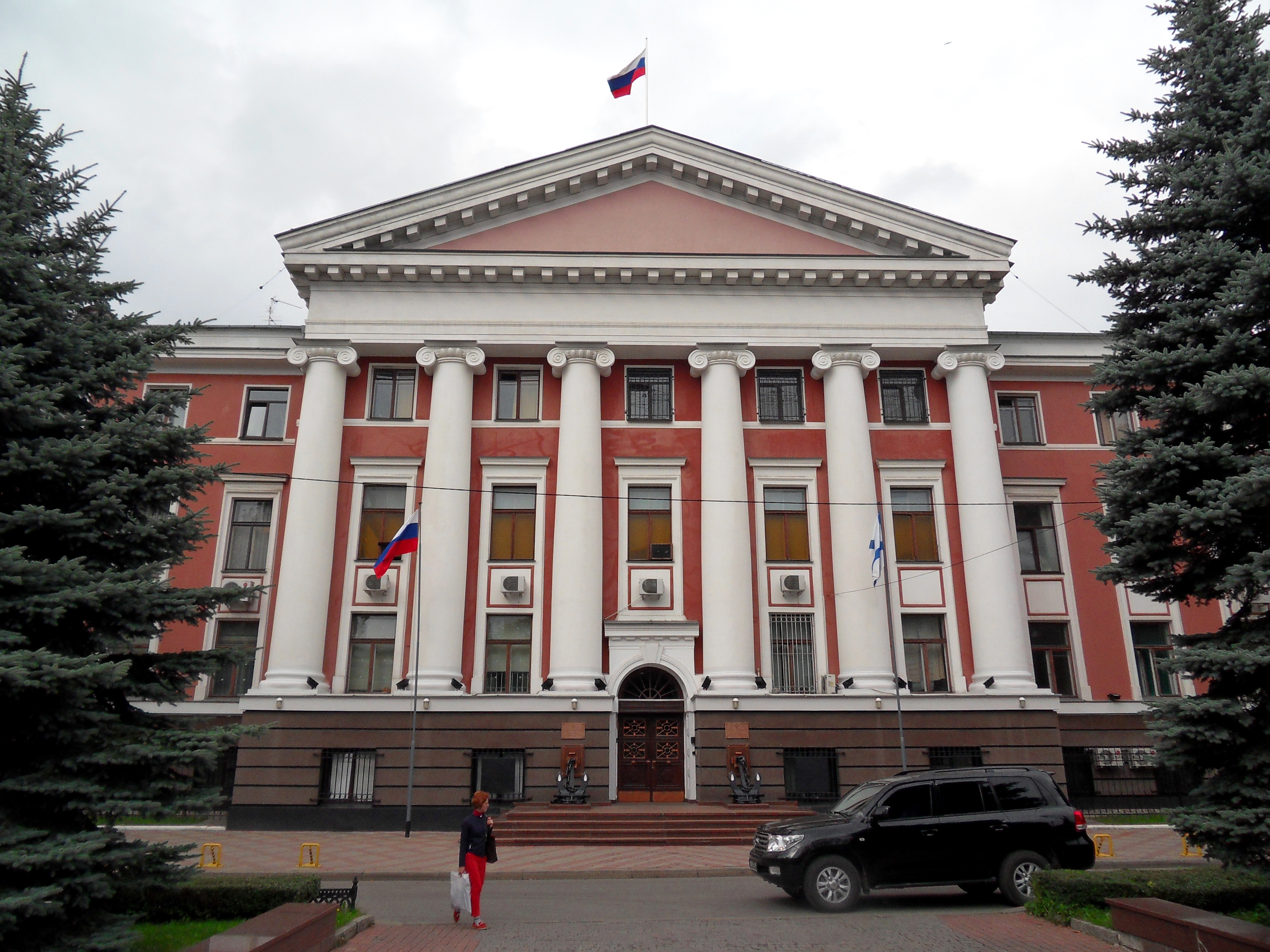 Бывшее здание верховной почтовой дирекции Кёнигсберга в Калининграде, ул. Грекова, 2 (Калиниградская область). По состоянию на 2017 год, в нём располагается штаб Балтийского флота Российской Федерации.